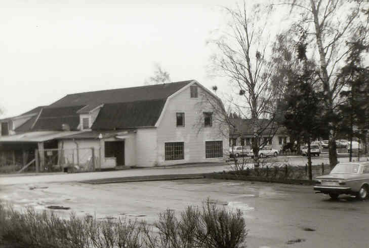 Fågelsta 1992, industribyggnaden som syns var då lokaler för tillverkningen av Fogelsta släp. En bild tagen av Harri Blomberg.